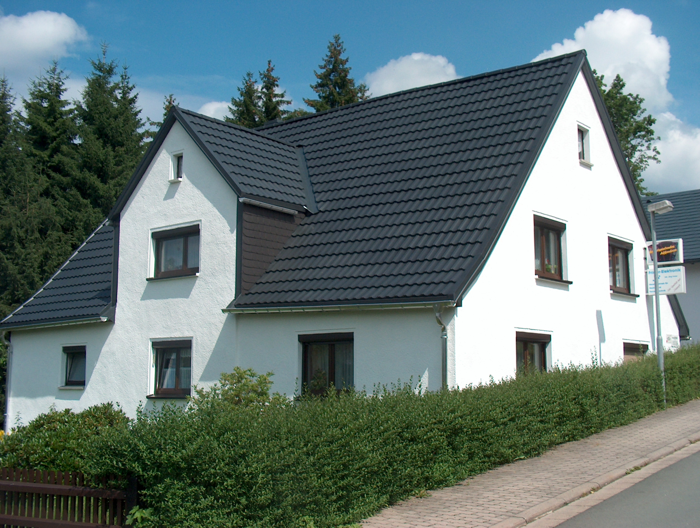 Geburtshaus Alwin Gerischs im Ortsteil Rautenkranz von Morgenröthe-Rautenkranz